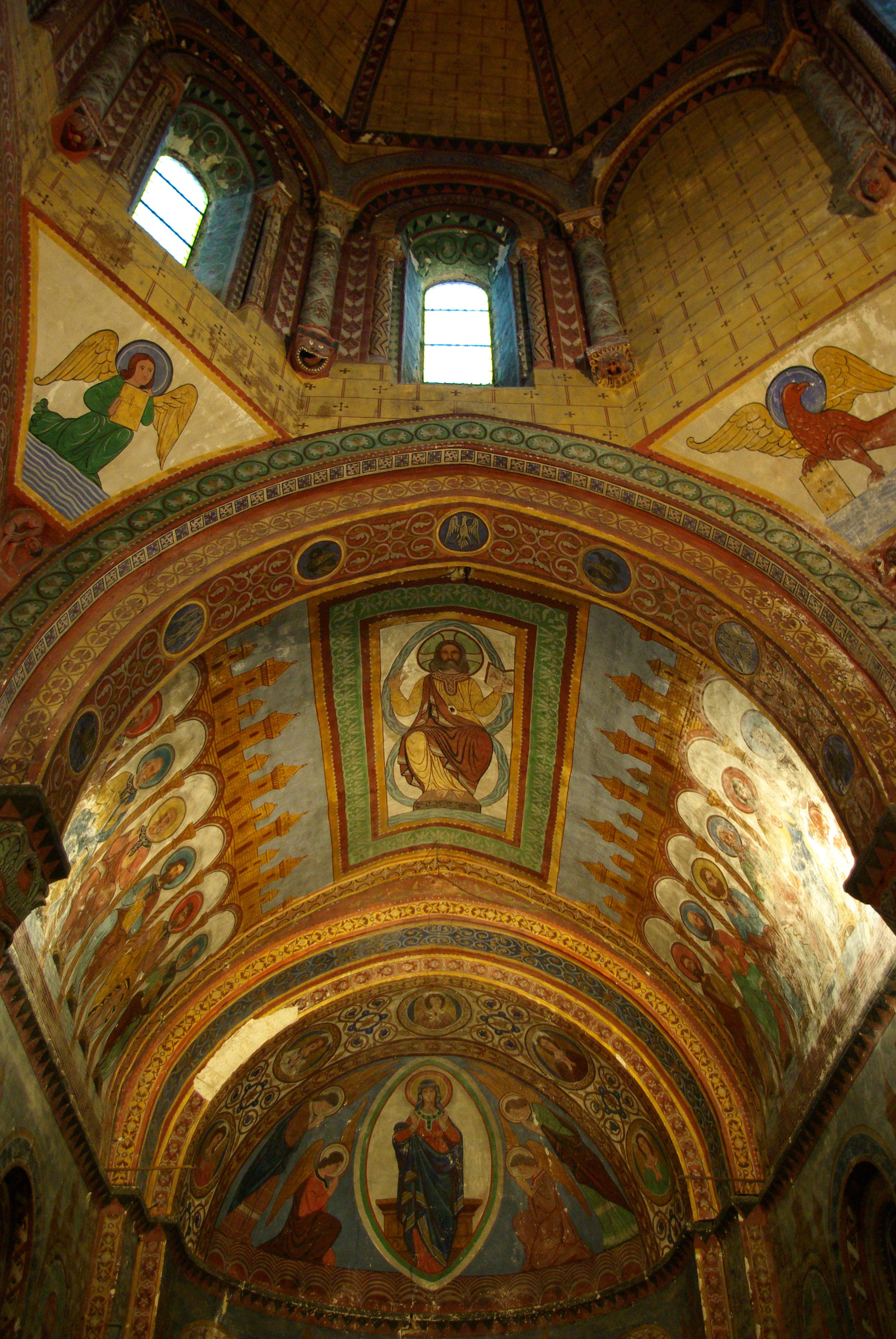 Plafond, de l'abside à la tour-lanterne, église Saint-Nicolas de Civray, Vienne, France.